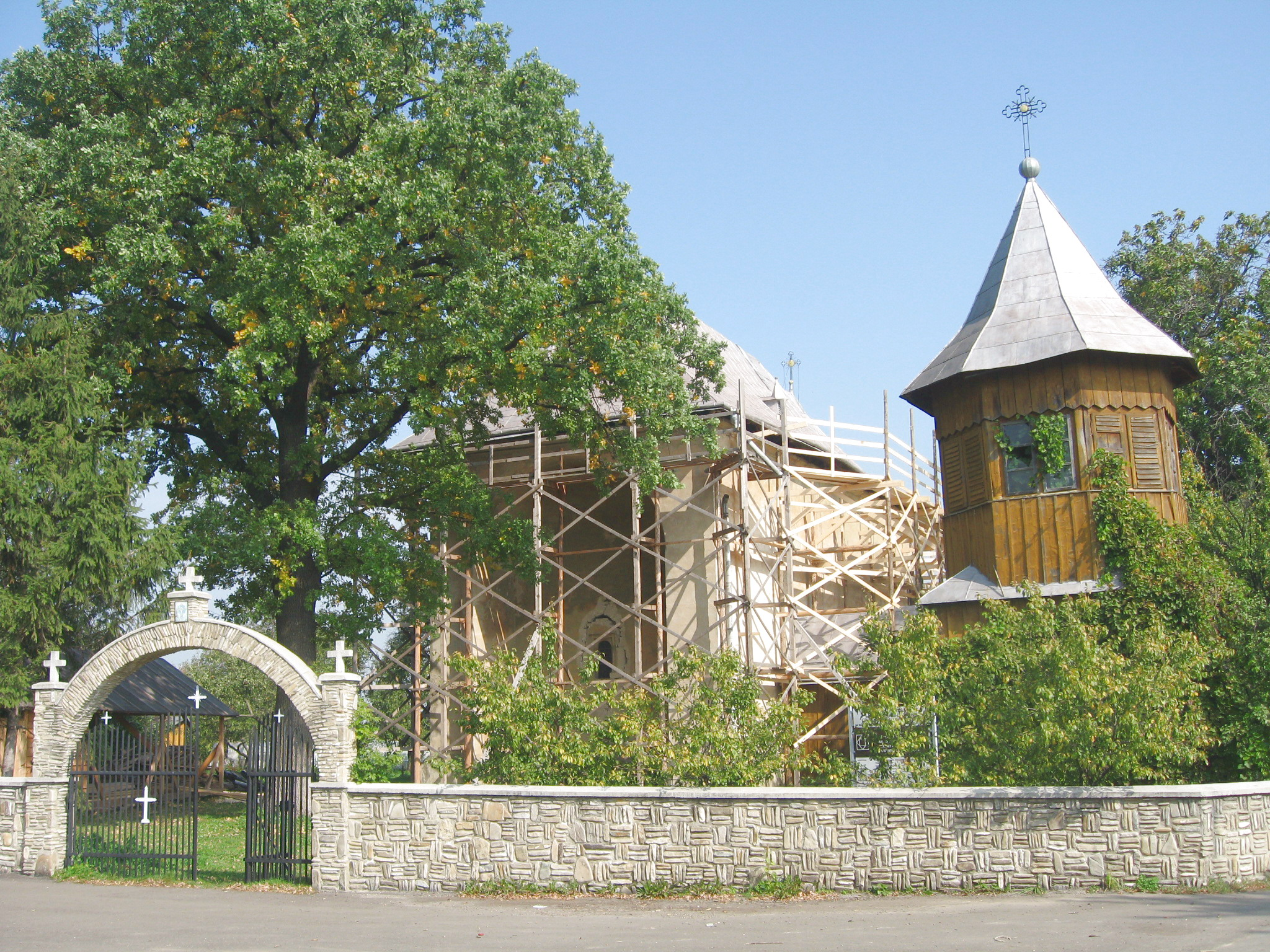 Biserica din Reuseni